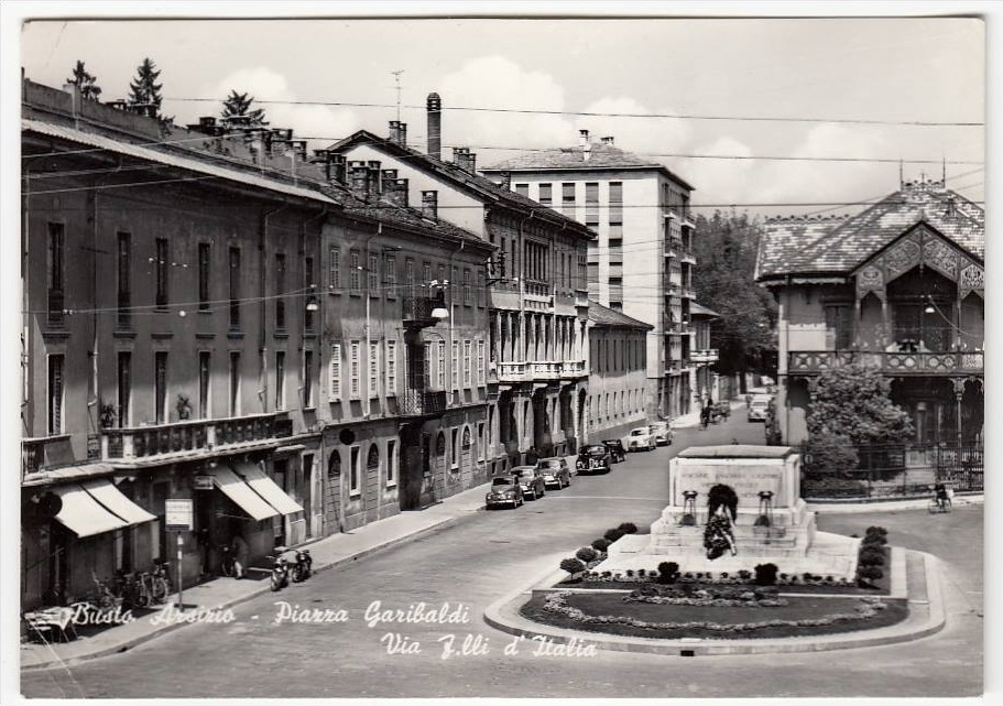 Piazza Garibaldi circa 1955